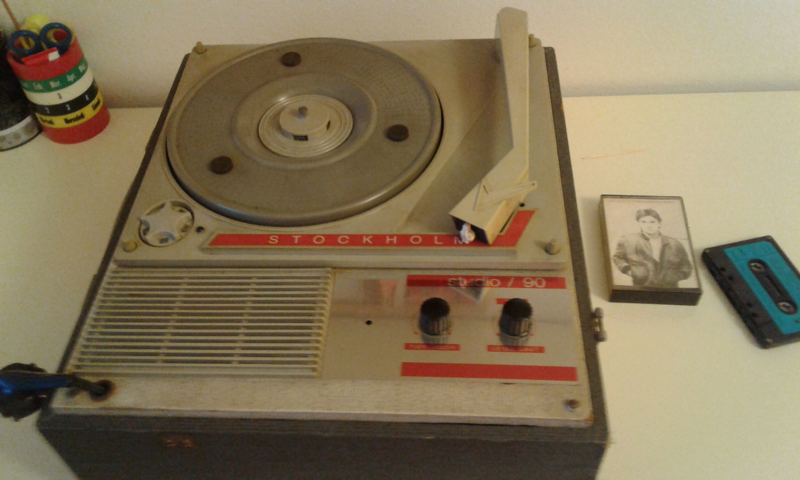 Srpskohrvatski / српскохрватски: Gramofon